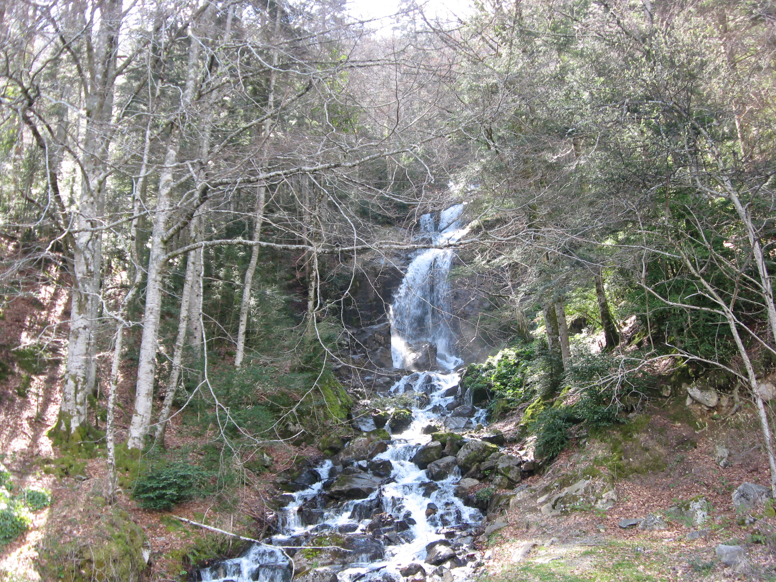 Cascade à Gabas (Pyrénées-Atlantiques) (Pyrénées).